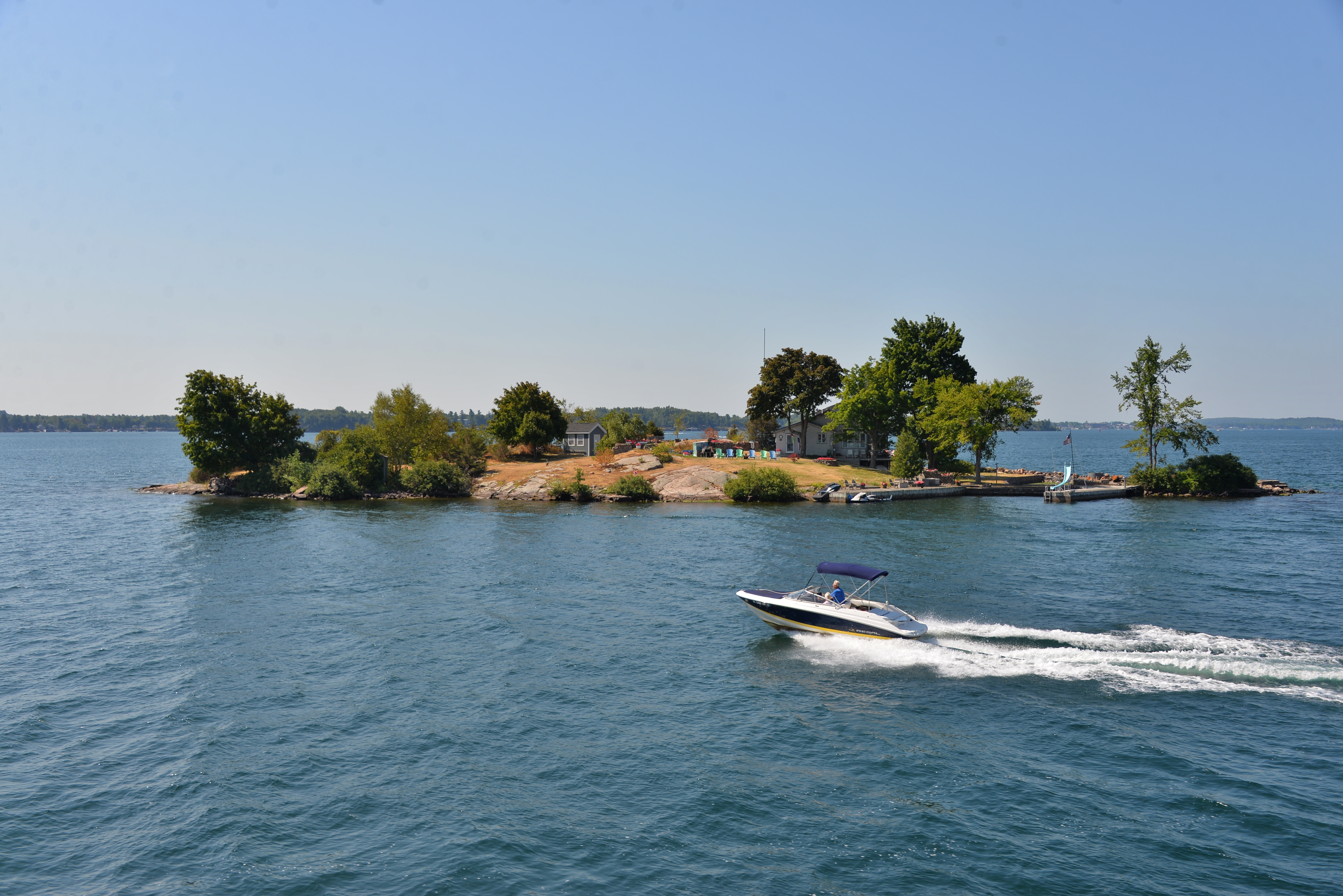 Котедж на одному з Тисячі островів на річці Св. Лаврентія